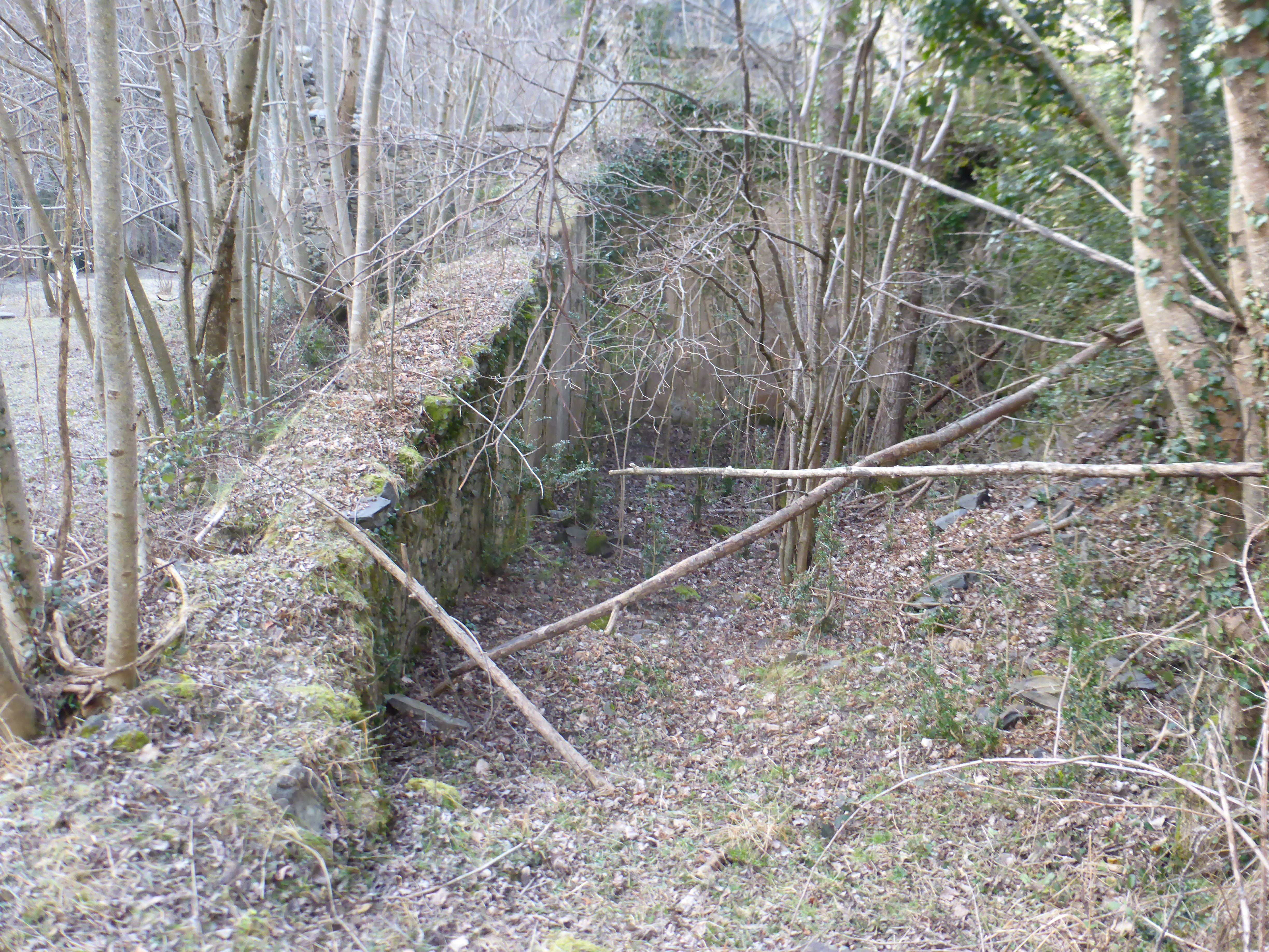 Molí d'en Bonada Serrat Queralbs Ripollès (37)